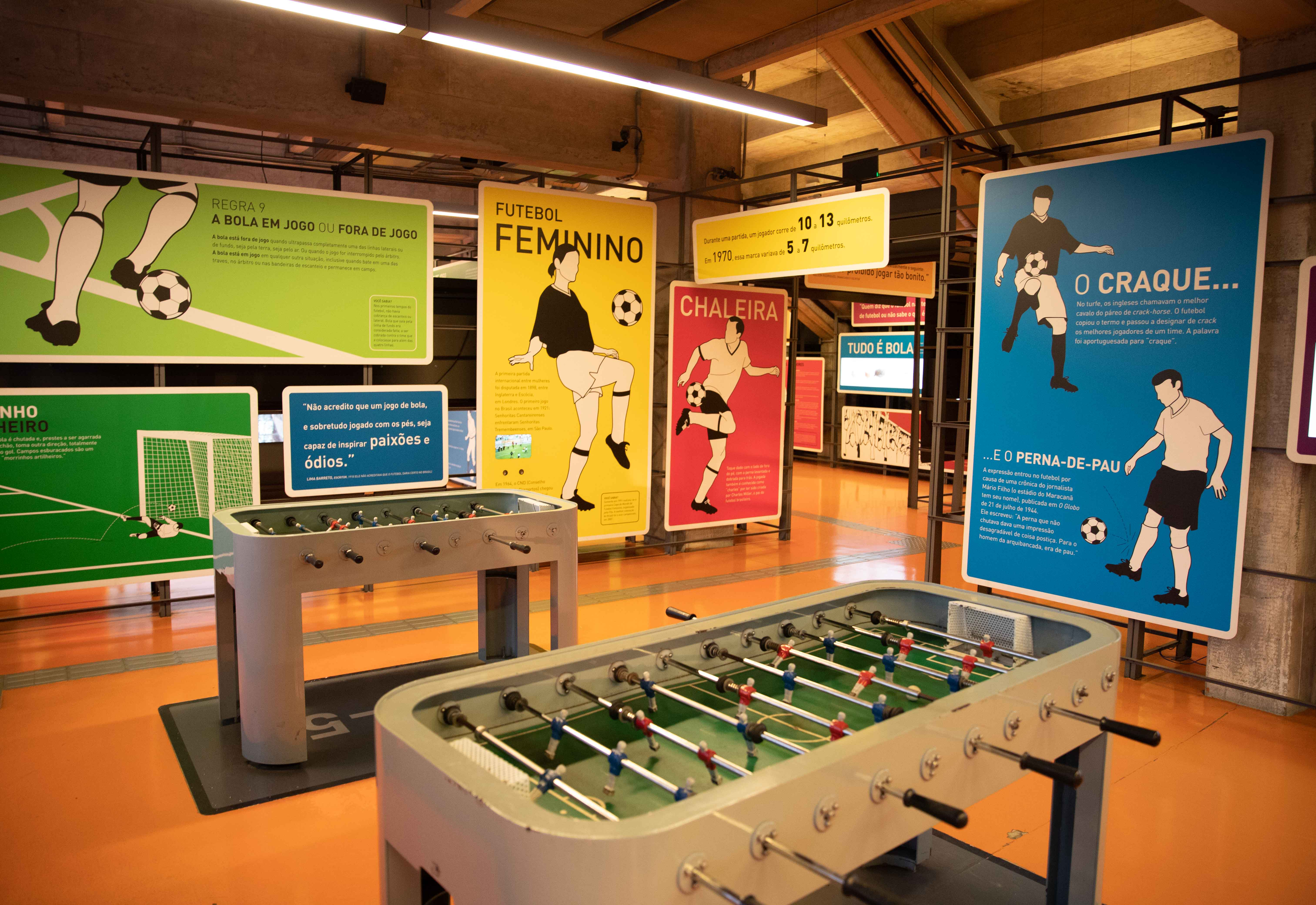 Torcedores assistem o jogo Brasil X Sérvia no Museu do Futebol. O Museu vai transmitir os jogos na Sala Jogo de Corpo, em um espaço decorado especialmente para a competição. Além dos jogos, o espaço terá opções de interatividade e programação especial de conteúdo. Local: São Paulo/SP Data: 27/06/2018. Foto: Luis Blanco/ Governo do Estado de São Paulo